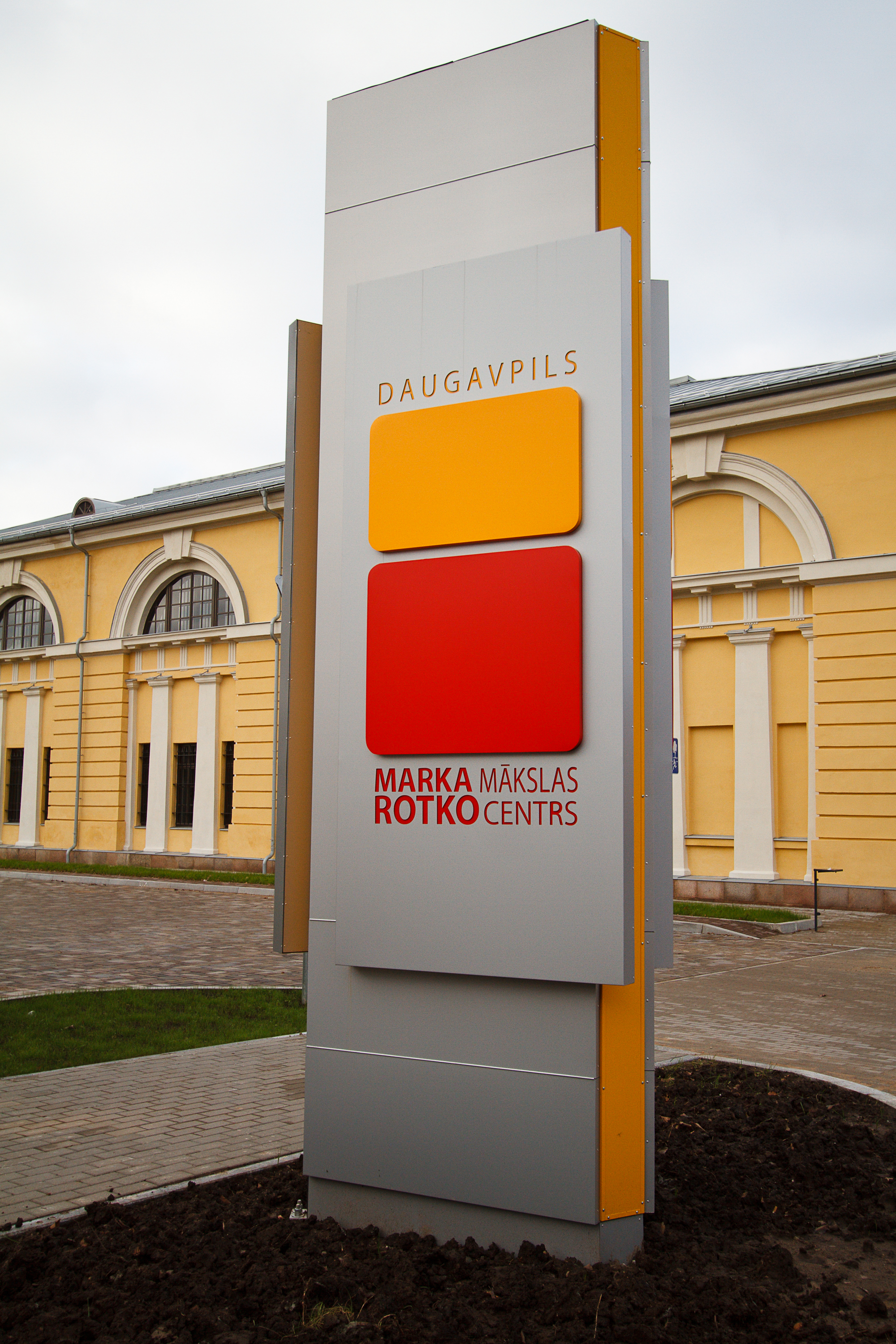 АРТ ЦЕНТР ИМ. МАРКА РОТКО В ДАУГАВПИЛСЕ